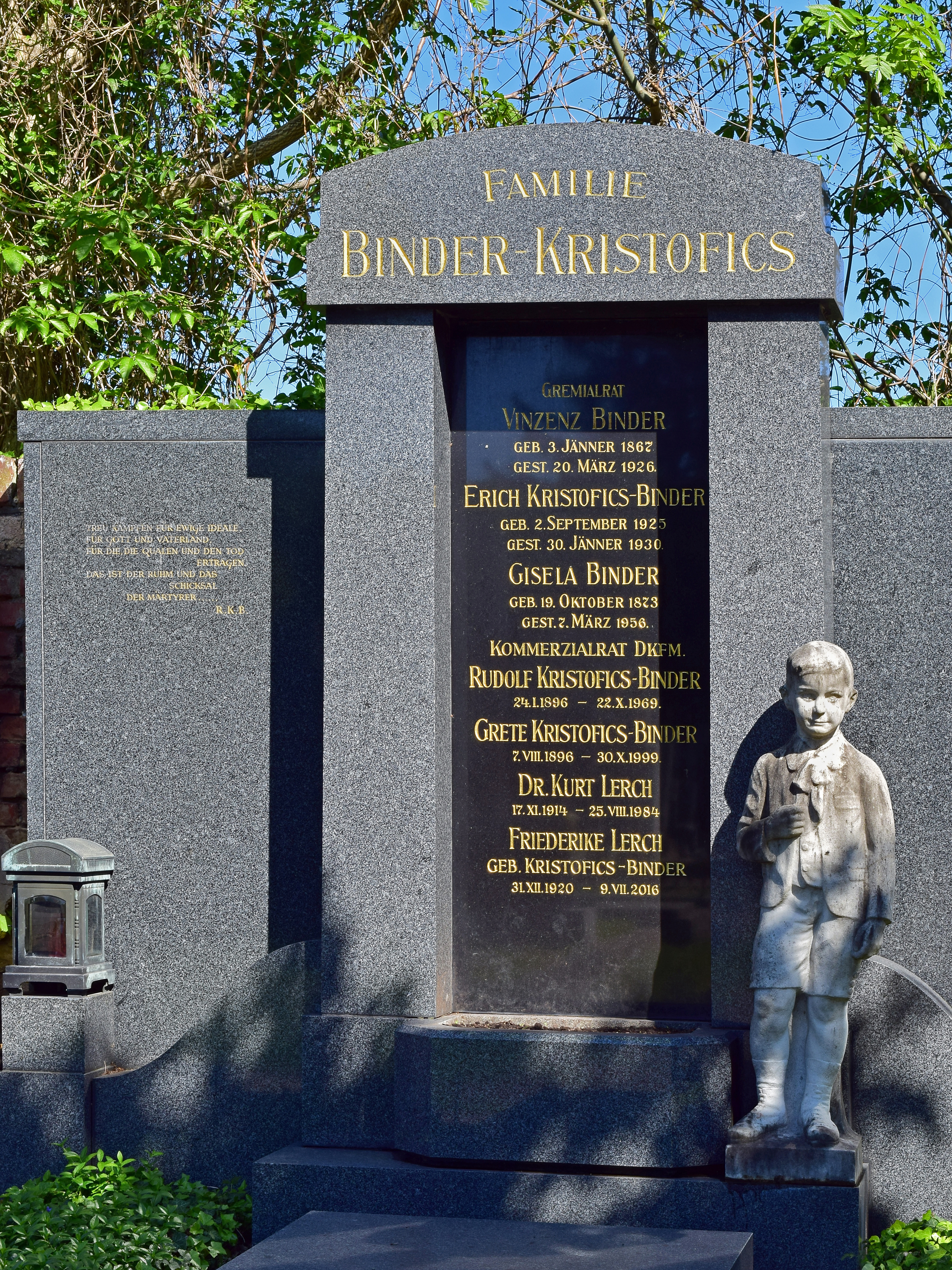 Ehrenhalber gewidmetes Grab von Rudolf Kristofics-Binder auf dem evangelischen Friedhof im Wiener Zentralfriedhof